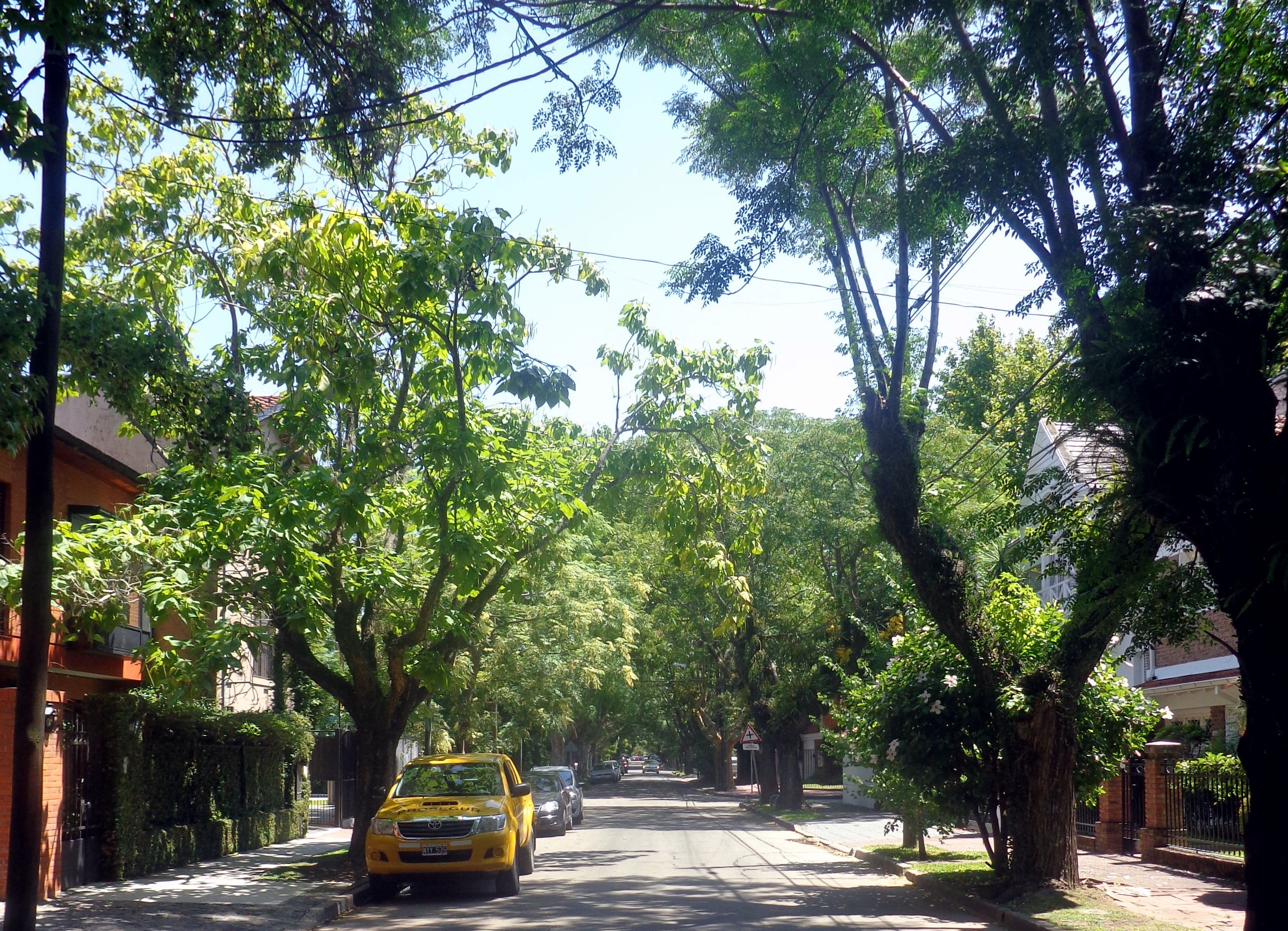 Calle José C Paz, entre General Pueyrredón y General Güemes, Acassuso, San Isidro, provincia de Buenos Aires, Argentina.